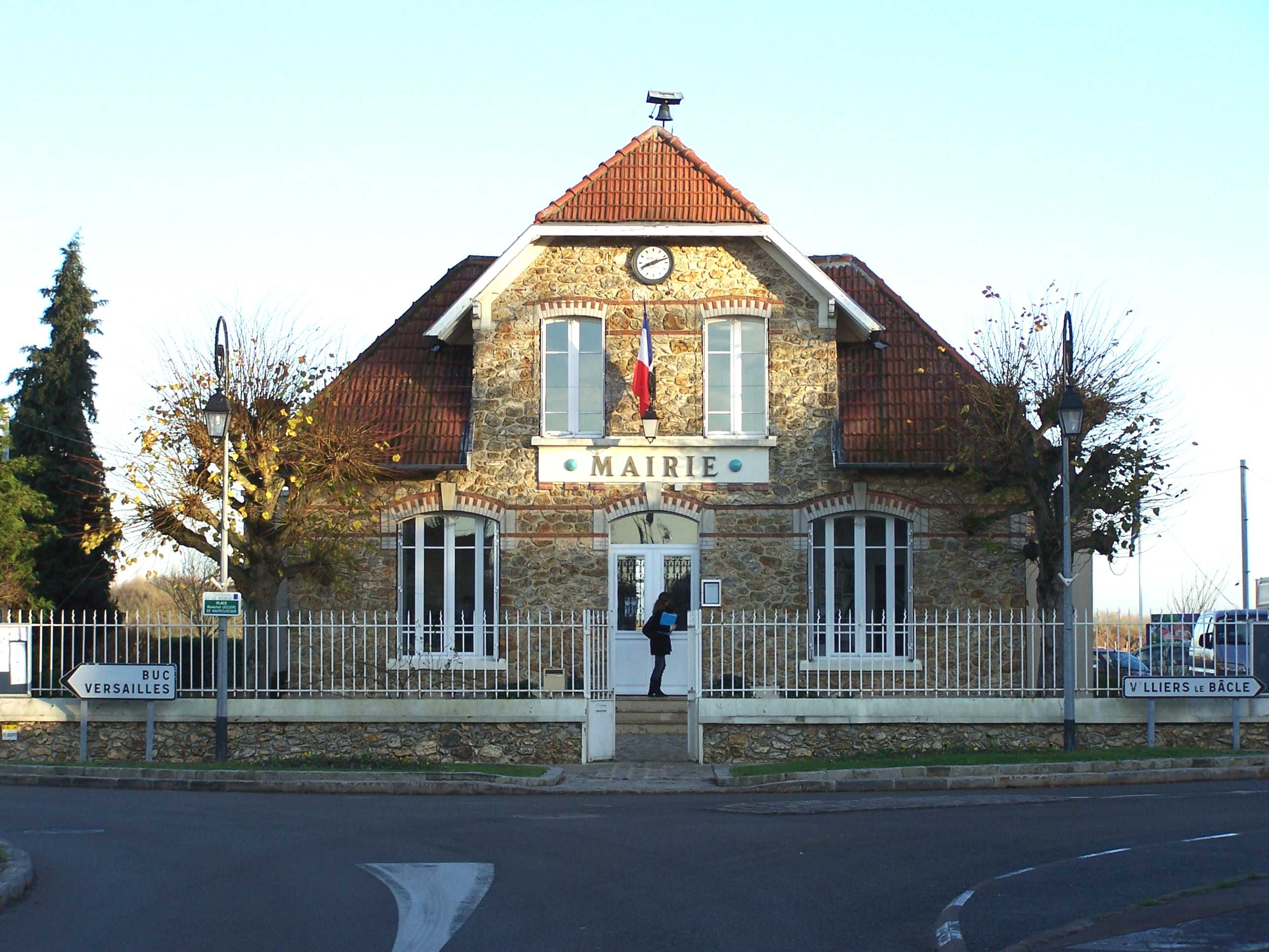 Mairie de Toussus-le-Noble (Yvelines, France)